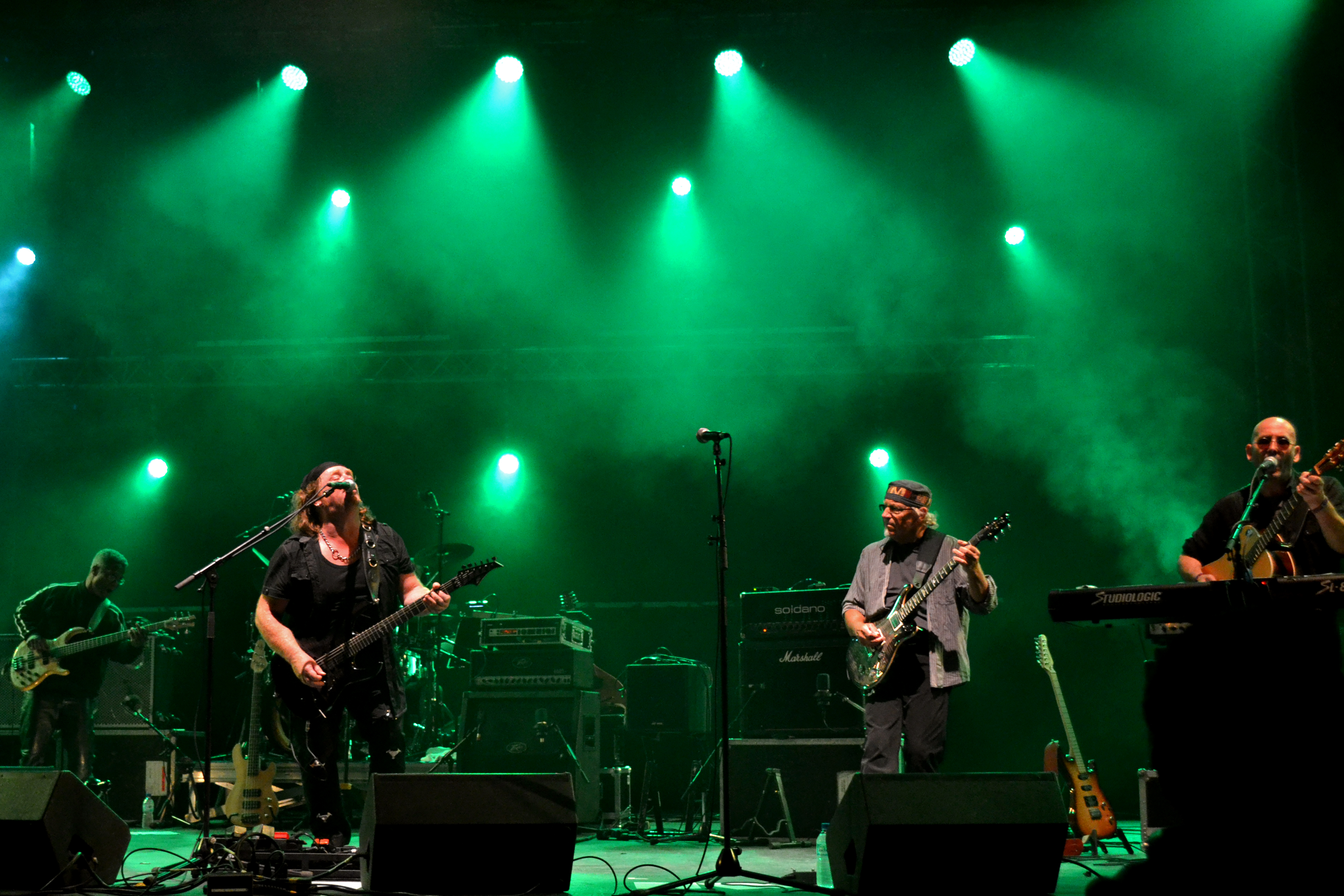 Martin Barre en guest pour le concert de Pat O'May au festival de la Saint-Loup à Guingamp le 12 août 2013.